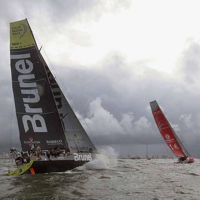 Pro-Am Race 2: Team Brunel vê o Dongfeng bem à frente rumo ao primeiro gate #vor #sailing #itajaistopover